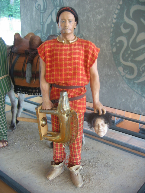 Aristocrate gaulois. Musée de la civlisation celtique, Bibracte, France.